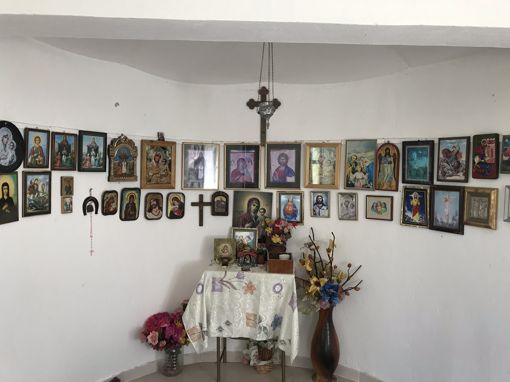 Иконостас в „София, Вяра, Надежда, Любов“